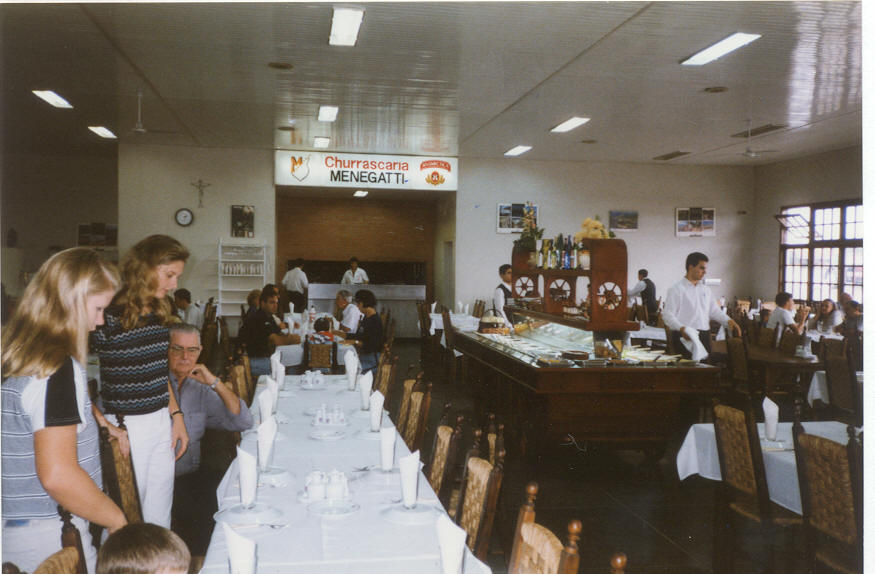 Churrasqueira in Carambeí, Brasil